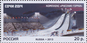 XXII Олимпийские зимние игры 2014 года в г. Сочи. Олимпийские спортивные объекты